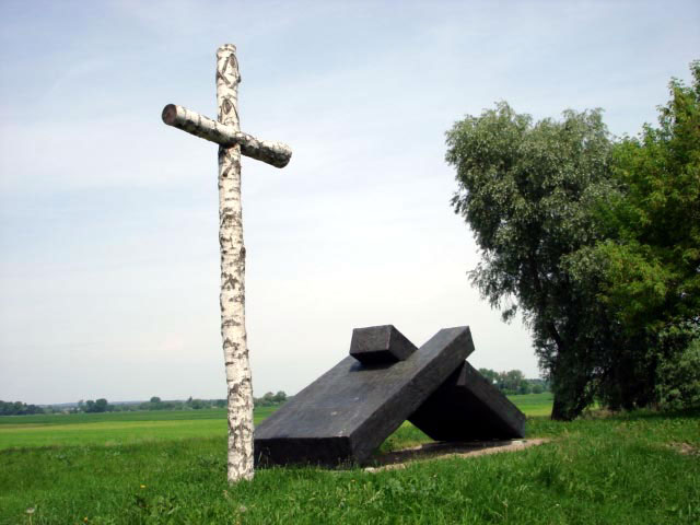 Neuranft - Flutzeichen (by Matthias Körner)